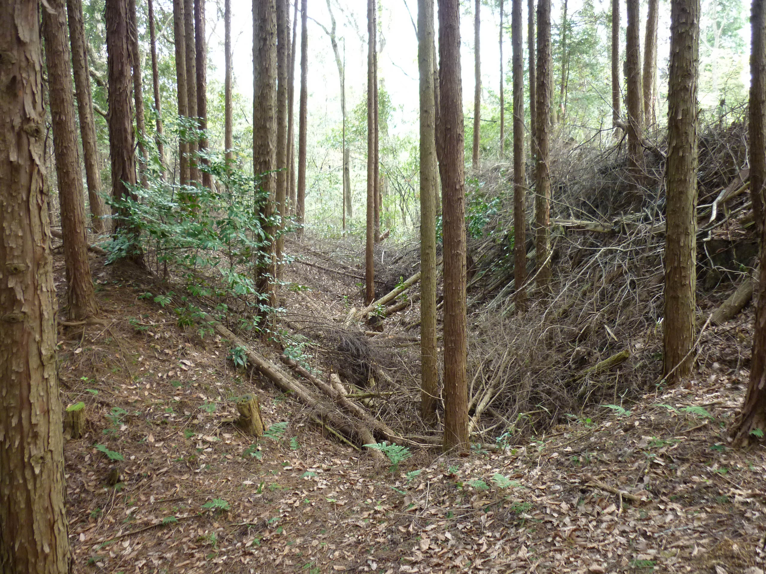 土塁跡